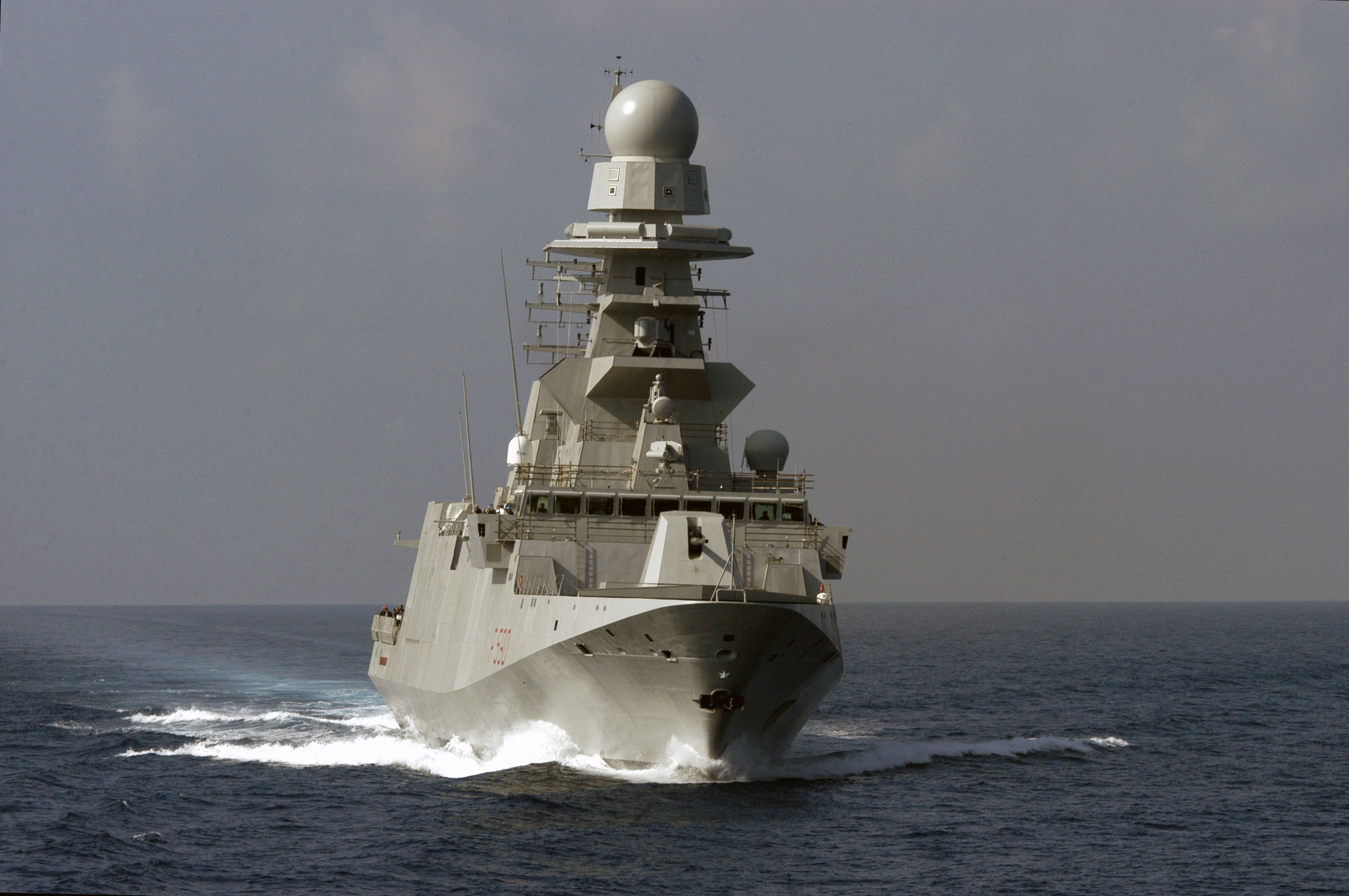 Prima uscita in mare di Nave Bergamini